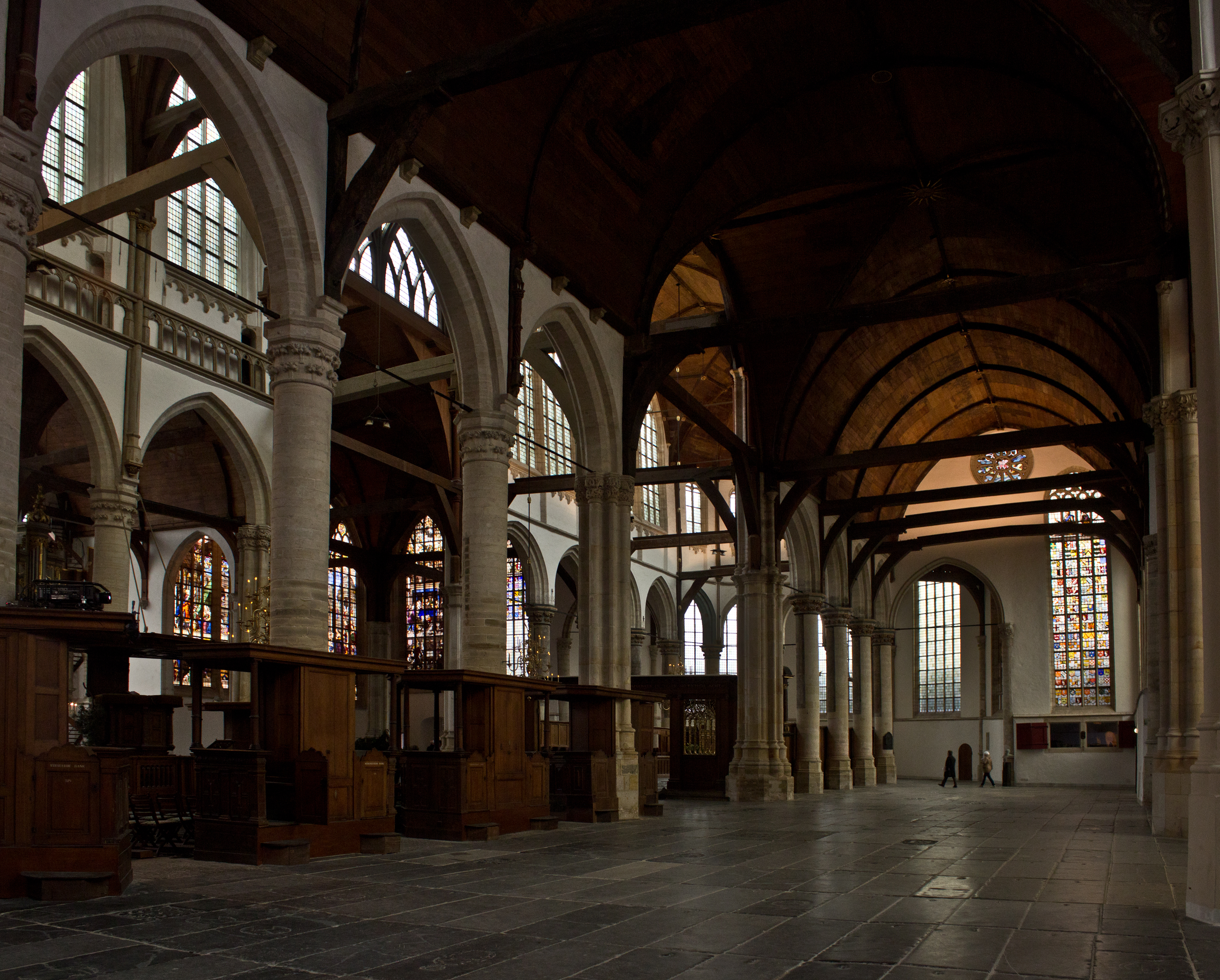 Amsterdam: Interieur van de Oude Kerk